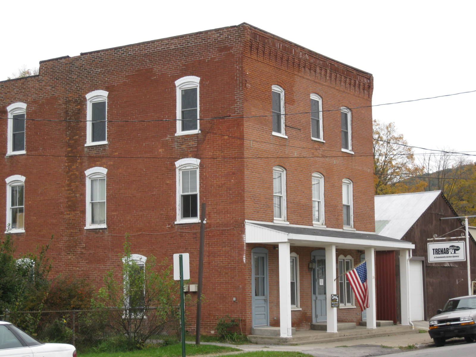 Great Bend, Pennsylvania